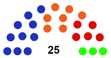 Concejales 2019 Majadahonda. PP: 10 // Ciudadanos: 7 // PSOE: 5 // Vox: 3